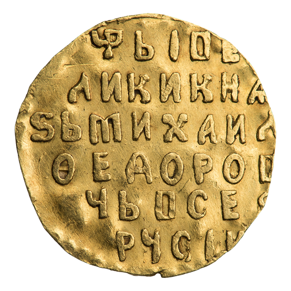 Деньга 1613—1645 гг., без даты. Царь Михаил Федорович Романов. Новодел. Биткин II К49 (R2). Реверс. Надпись в шесть строк: ЦЬ I ВЕЛИКИ КНѦSЬ МИХАИЛ[О] ѲЕДОРОВЧЬ ВСЕ[Ѧ] РУСIИ